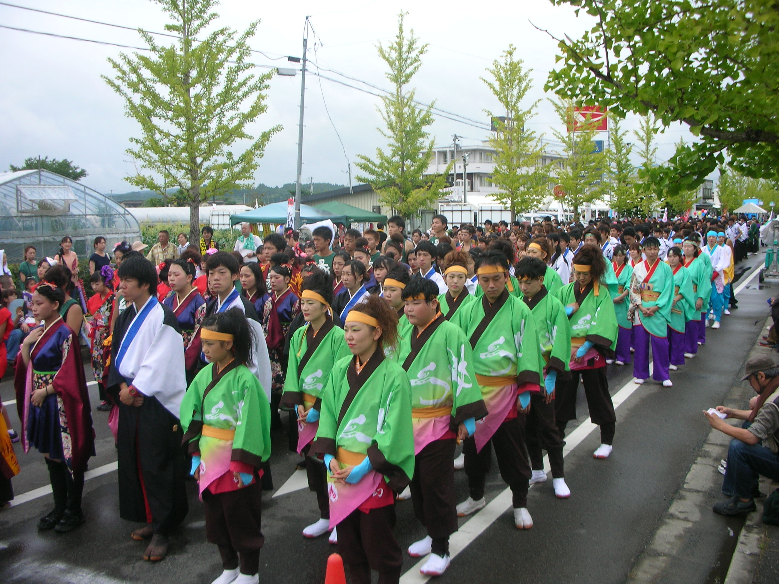 開会式の時の整列